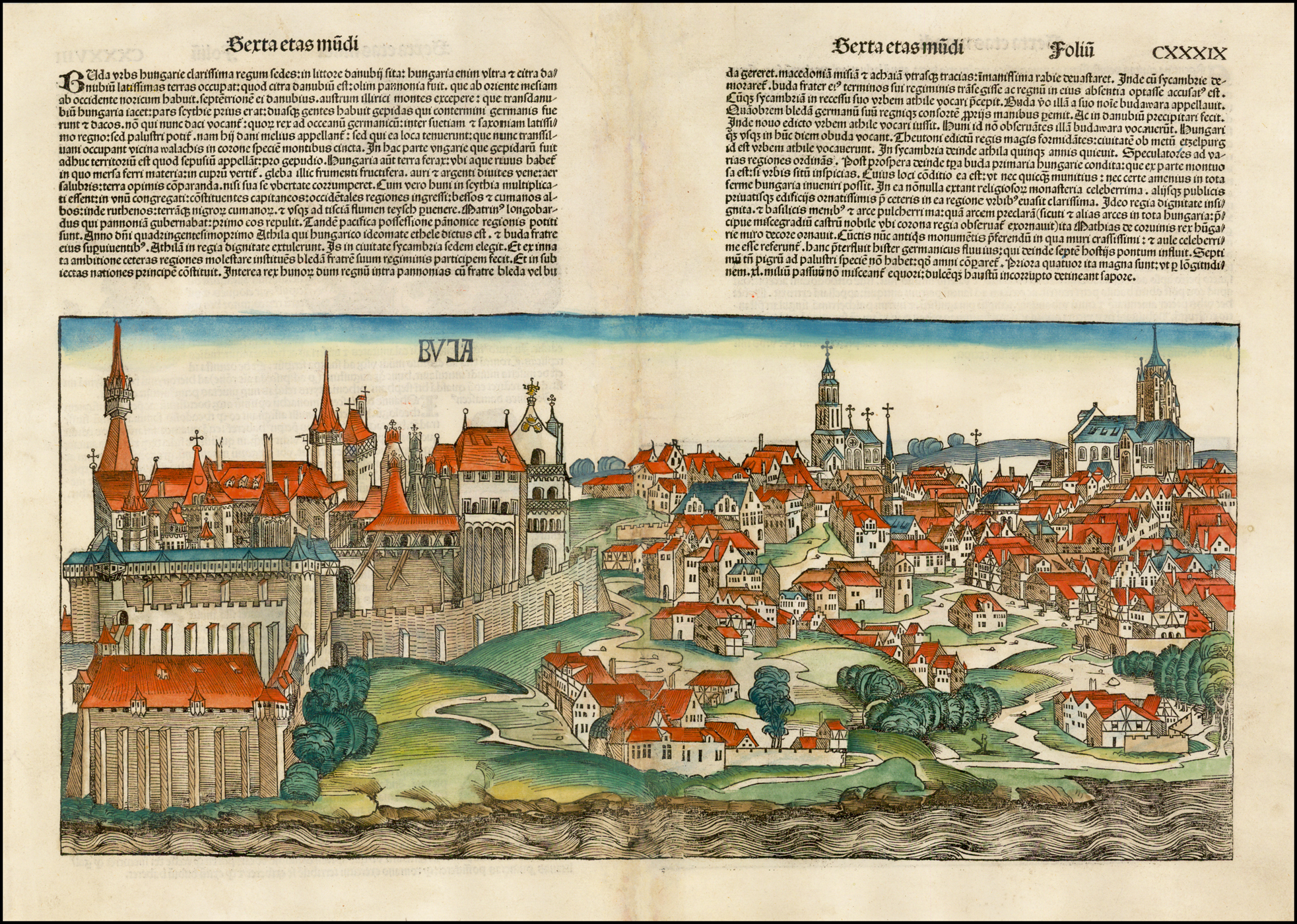 Buda ábrázolása a Nürnbergi krónikában